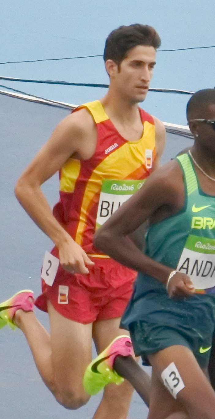 Rio 2016 - Eliminatórias 1500m Masculino